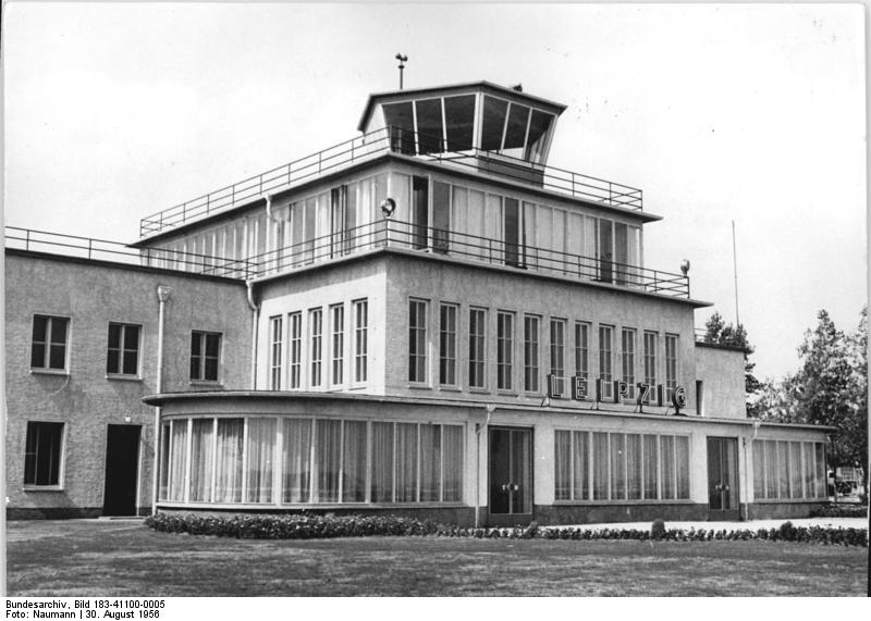 Leipzig, Flughafen, Empfangshalle Zentralbild Naumann Wo.-Bö. 30.8.1956. Eröffnung der Flugstrecke Berlin-Leipzig zur Herbstmesse 1956. Mit einem Probeflug, an dem Vertreter der Deutschen Lufthansa teilnahmen, wurde am 29.8.1956 der Sonderflugverkehr zur Leipziger Herbstmesse eröffnet. UBz: Blick auf die Empfangshalle des Flugplatzes Leipzig-Mockau.